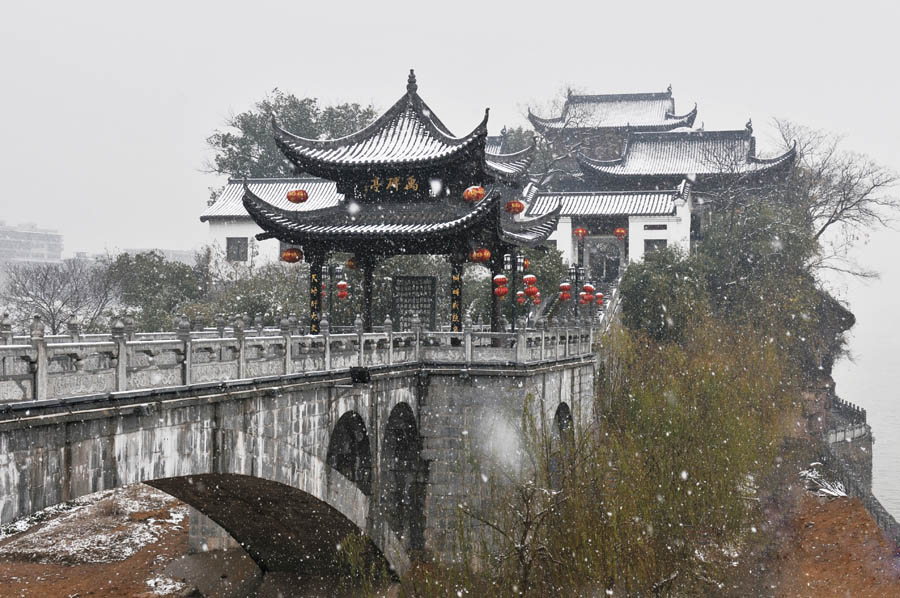 雪中禹碑亭